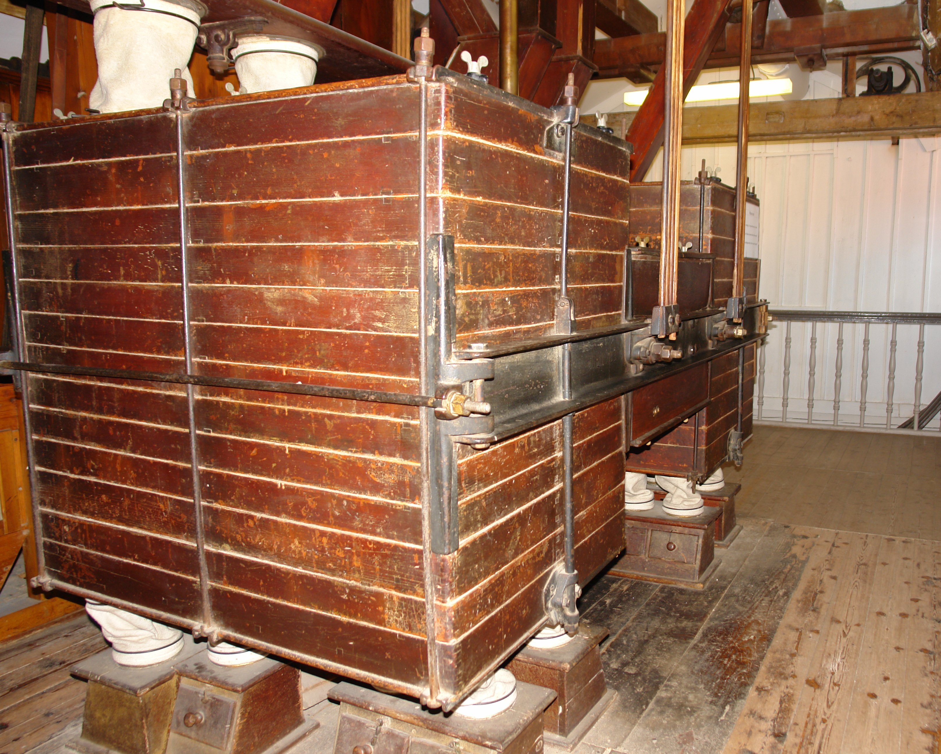 Plansichter einer historischen Mühle in Erfurt